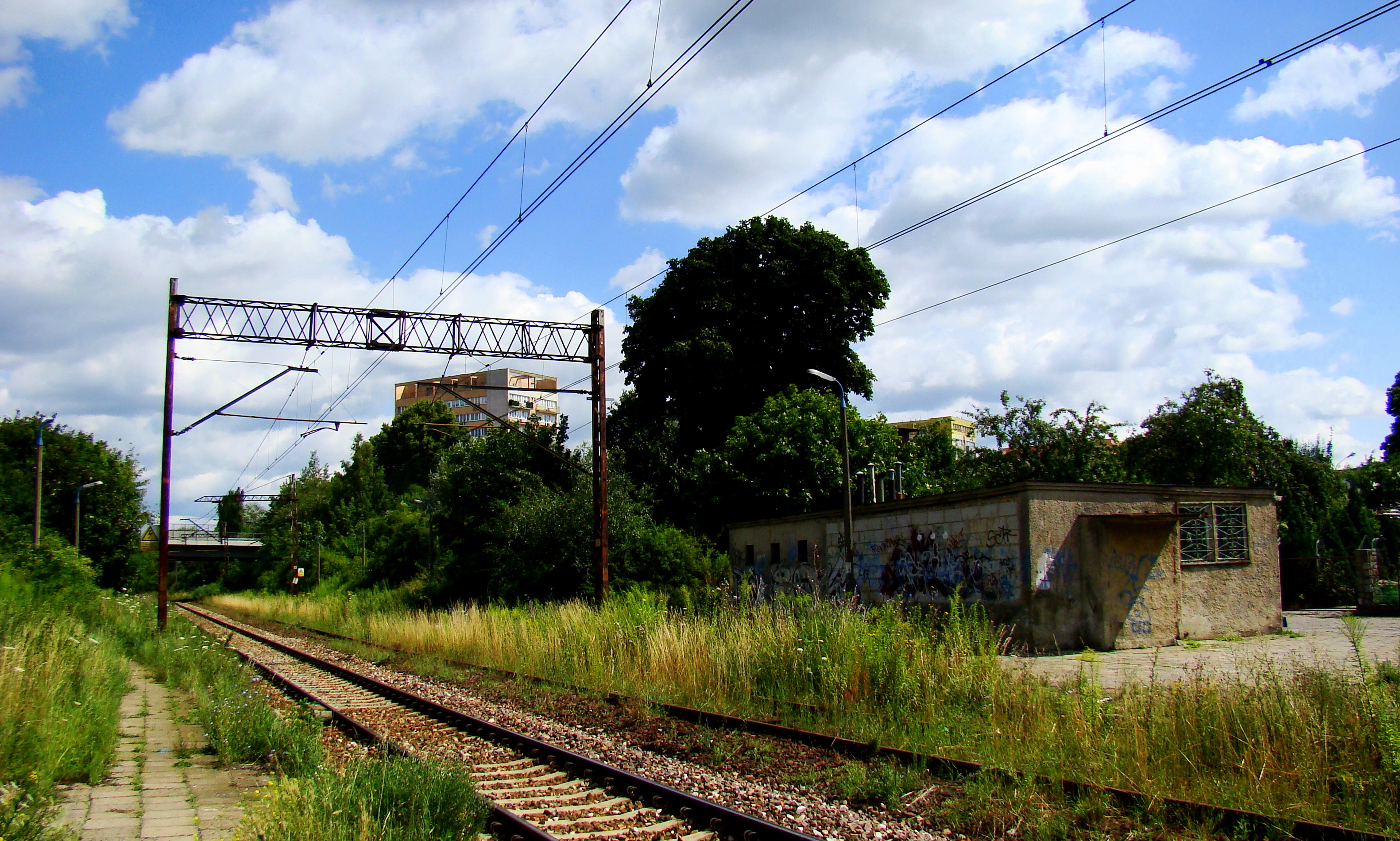 Szczecin Drzetowo, przystanek kolejowy (nieczynny), (Szczecin, Województwo zachodniopomorskie), Polska